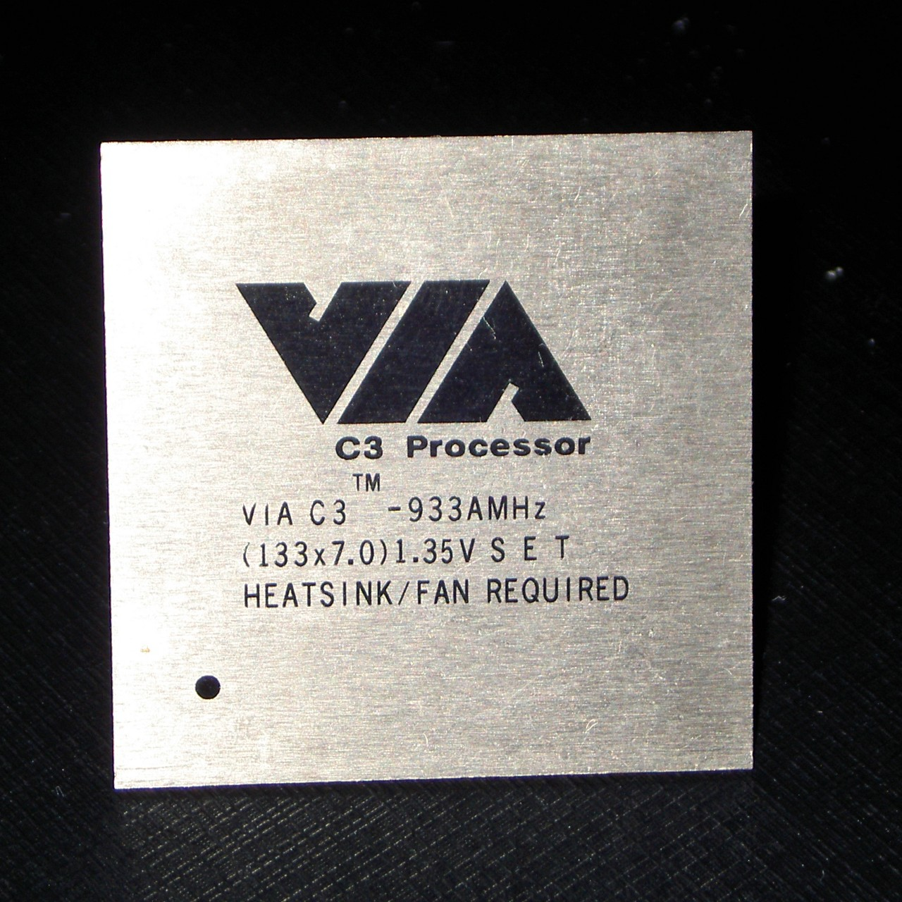 "VIA Mobile C3 Processe 933AMHz (C5N/Ezra-T)"